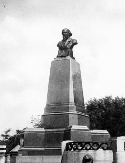 Саратов. Памятник Н.Г.Чернышевскому на постаменте ранее занимаемом памятником Александру II